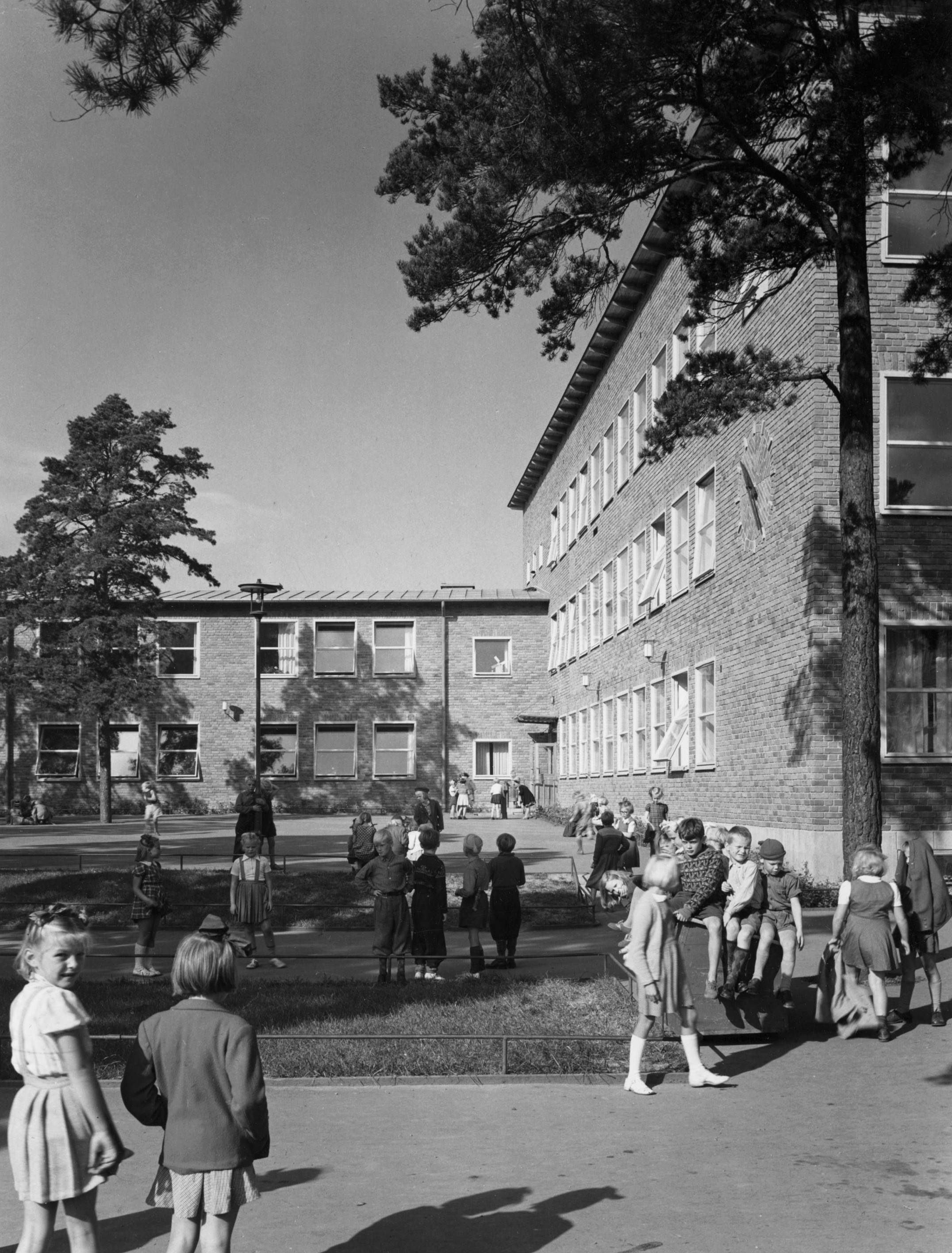 Skanskvarns folkskola, (Skanskvarnsskolan) arkitekt Paul Hedqvist